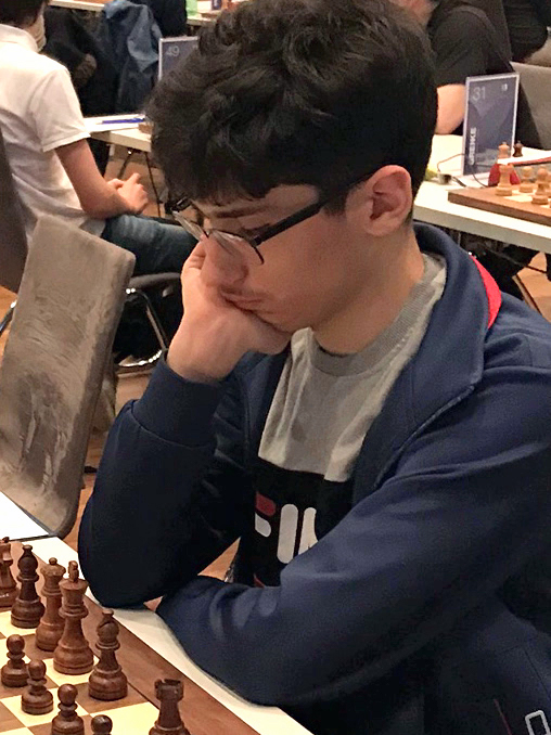 Alireza Firouzja, Runde 9 der Grenke Chess Open 2019 in Karlsruhe.